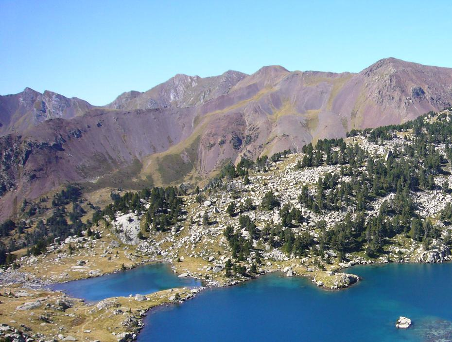 Desguas de l'Estany Gémena de Baix vist des de la Serra Plana; la Vall de Boí, Alta Ribagorça, Catalunya